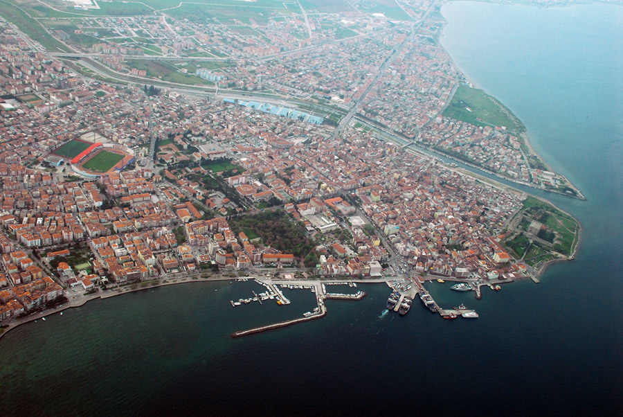 Havadan Çanakkale - Murat